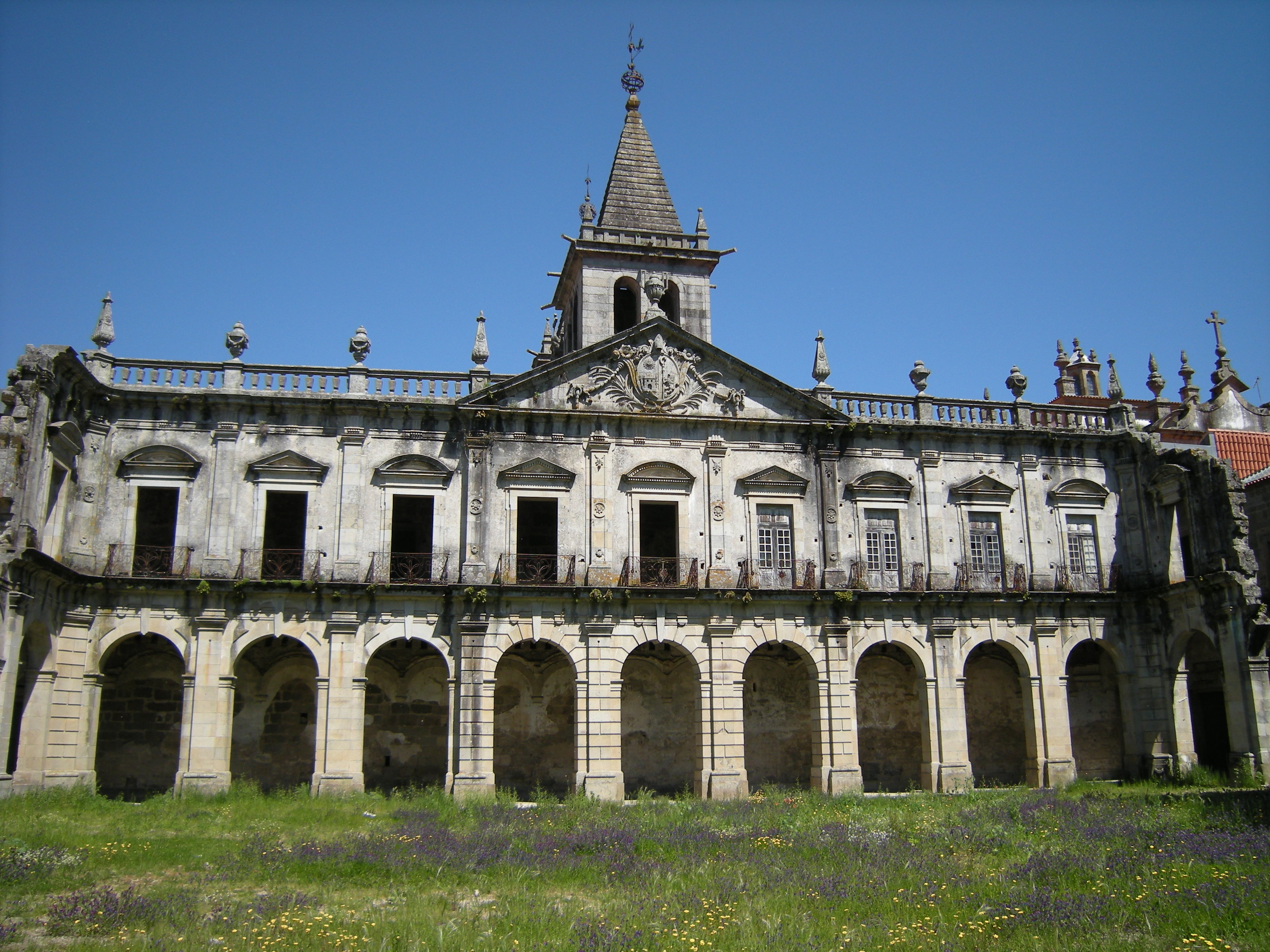 Santa Maria de Pombeiro Monastery, Pombeiro de Ribavizela, Felgueiras, Portugal.